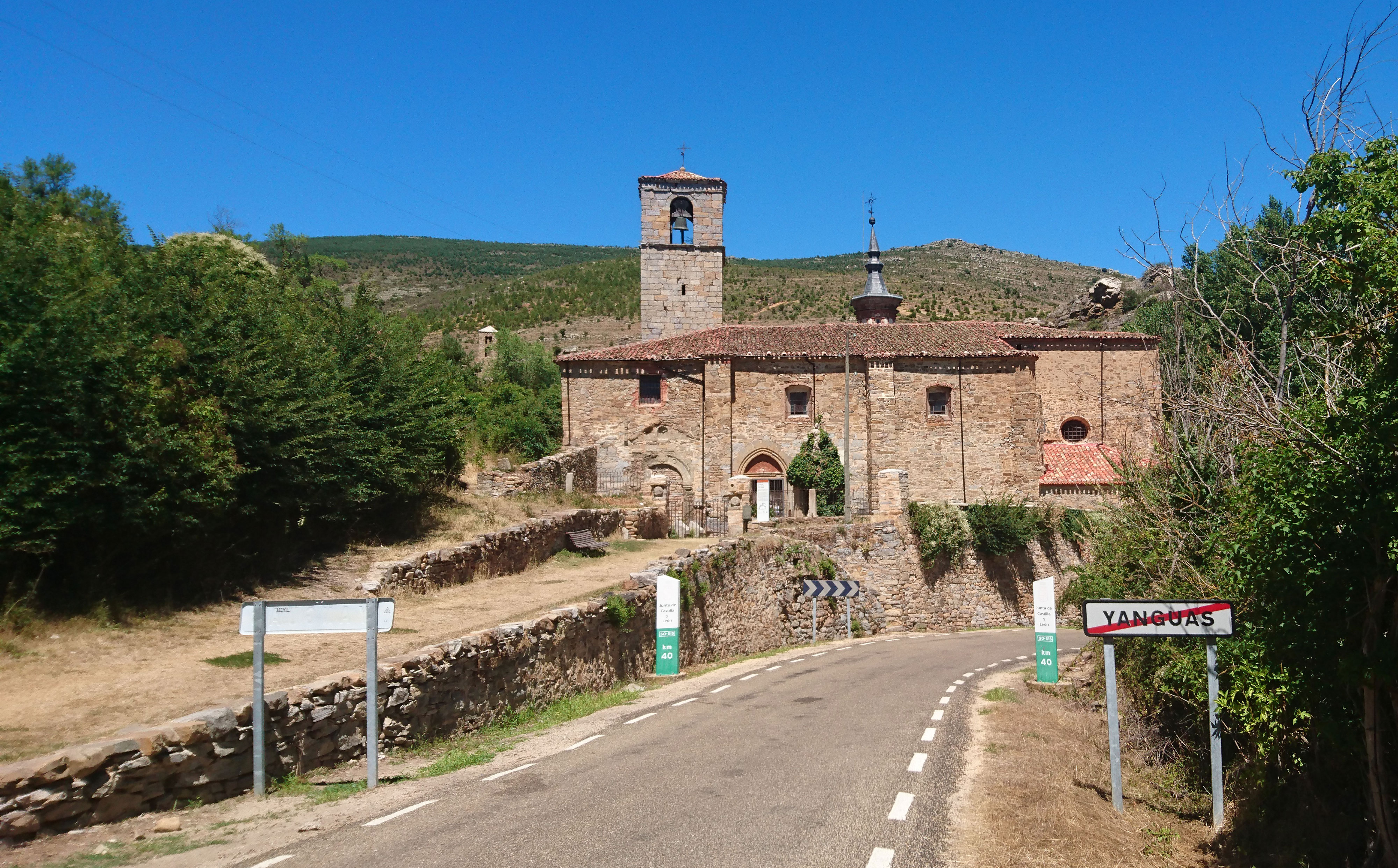 Iglesia de Santa Maria - Yanguas